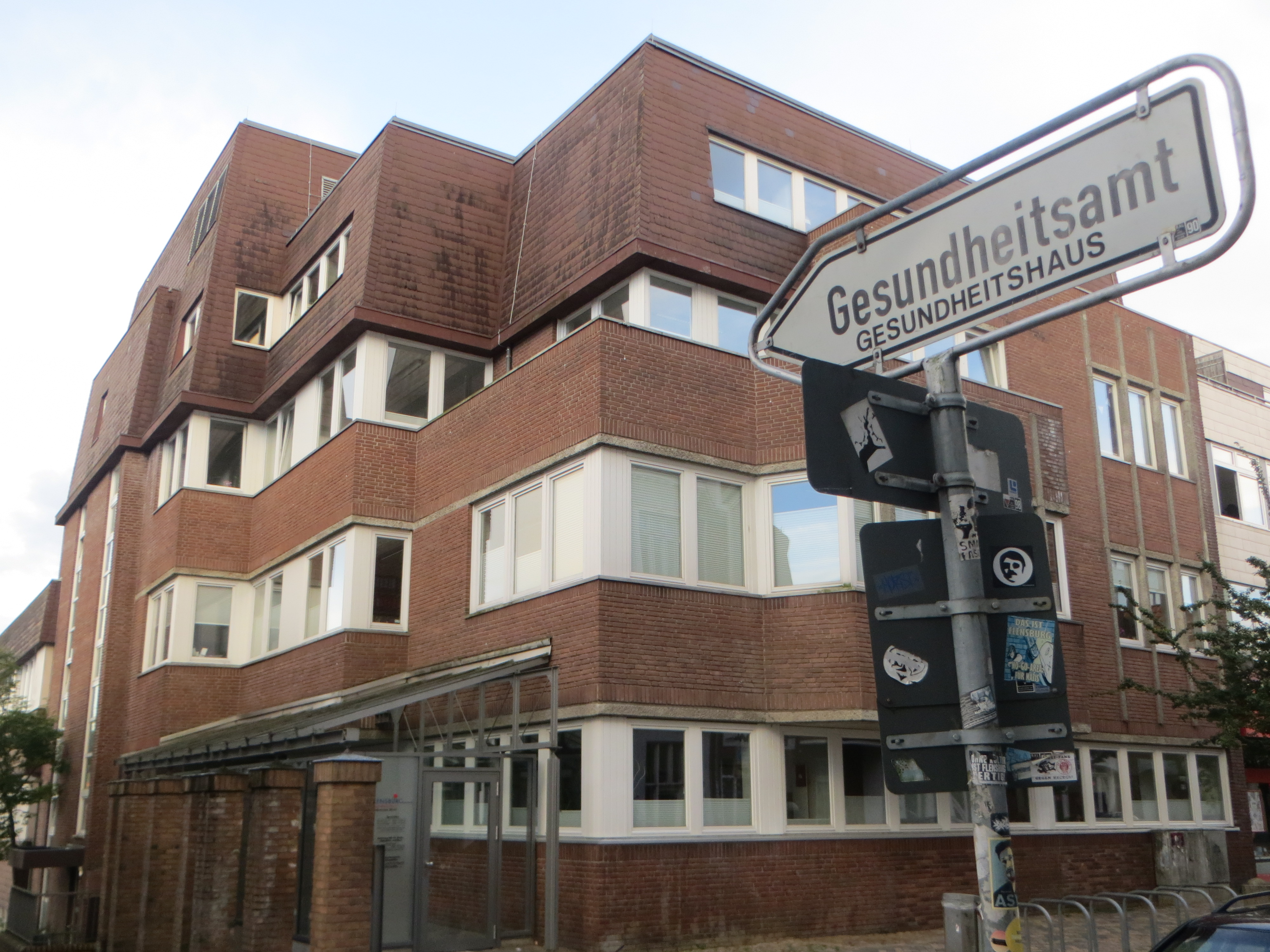 Hinweisschild Gestundheitsamt mit dem Gesundheitsamt dahinter (Flensburg), Bild 03